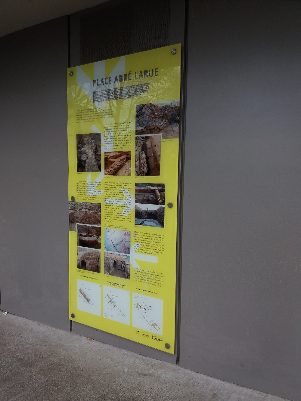 Présentation des résultats des fouilles archéologiques de 2012.